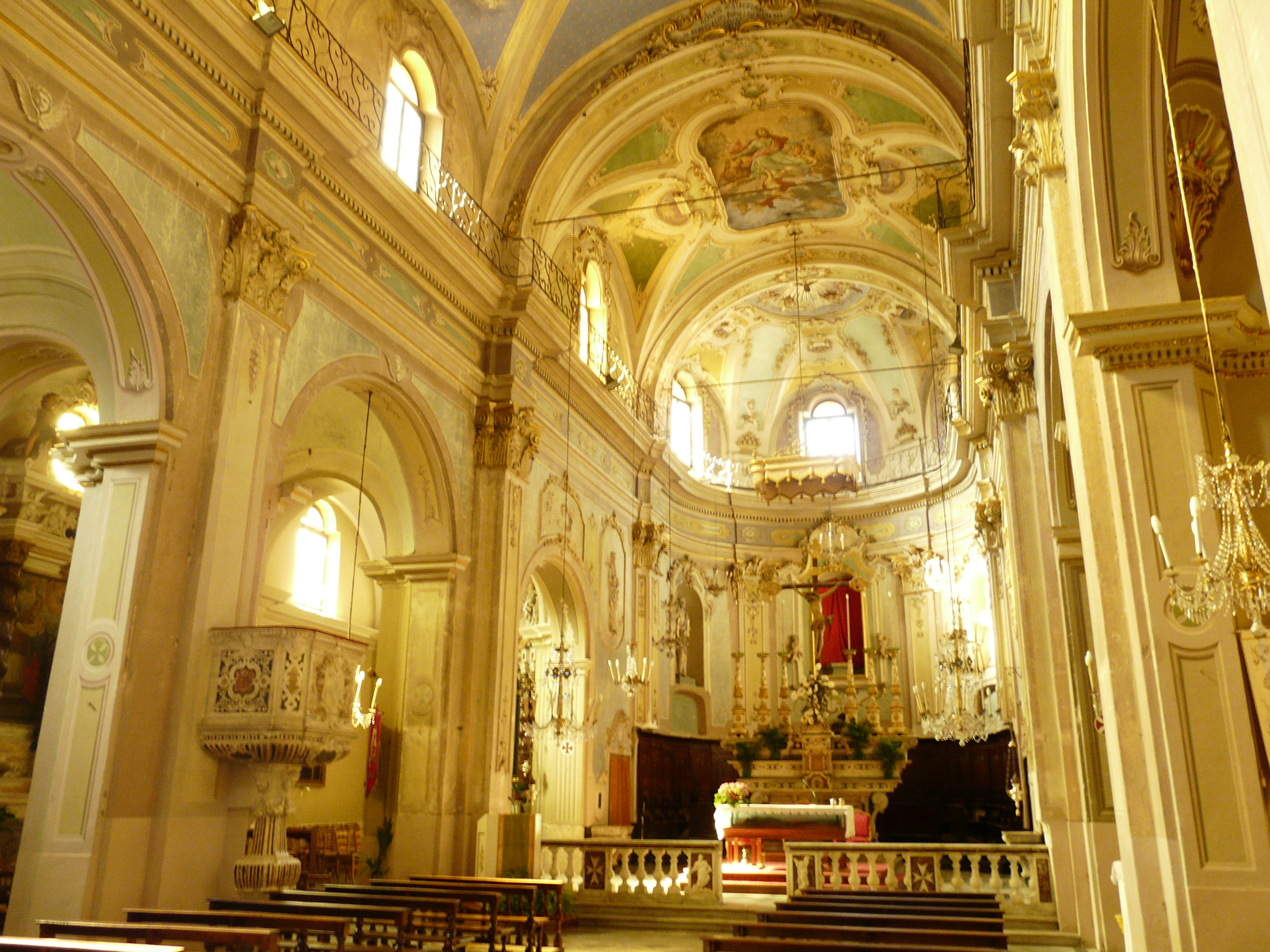 Chiesa di San Marco Evangelista di Camporosso, Liguria, Italia